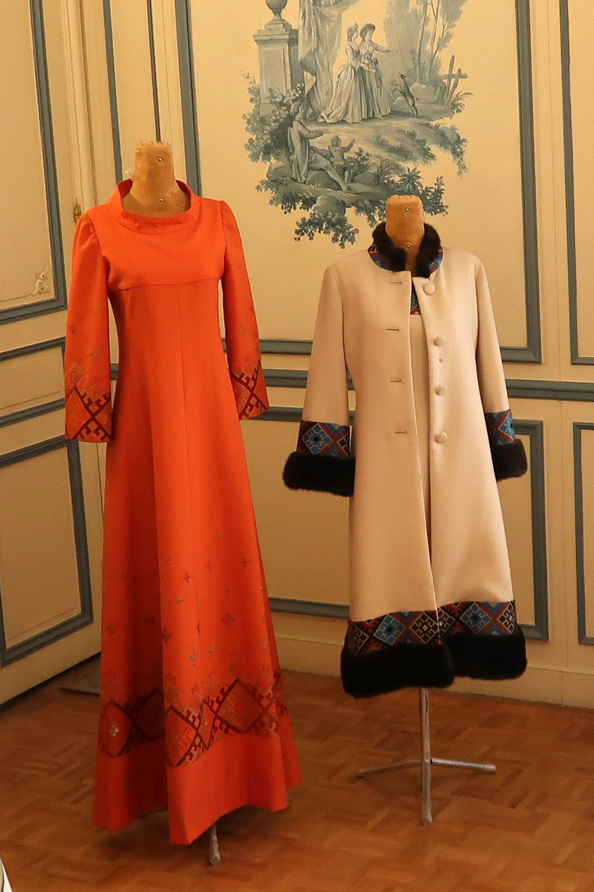 لباس متعلق به فرح پهلوی کاخ نیاوران